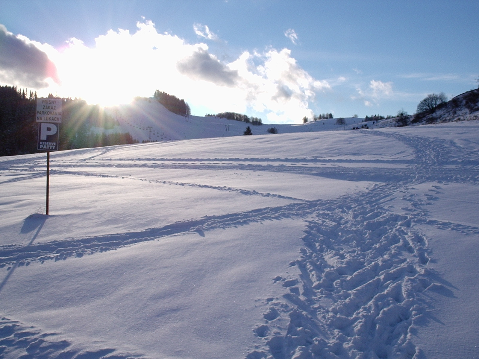 Téli tájkép, Dóval (Donovaly), Szlovákia